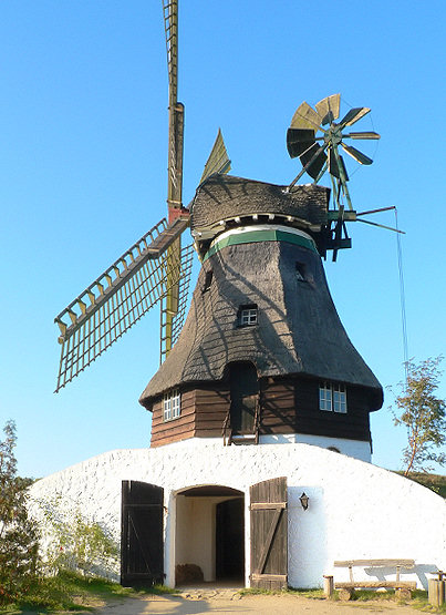 Kellerholländer Mühle Immanuel im Mühlenmuseum Gifhorn Foto aufgenommen von Benutzer Benutzer:Axel Hindemith, Oktober 2005